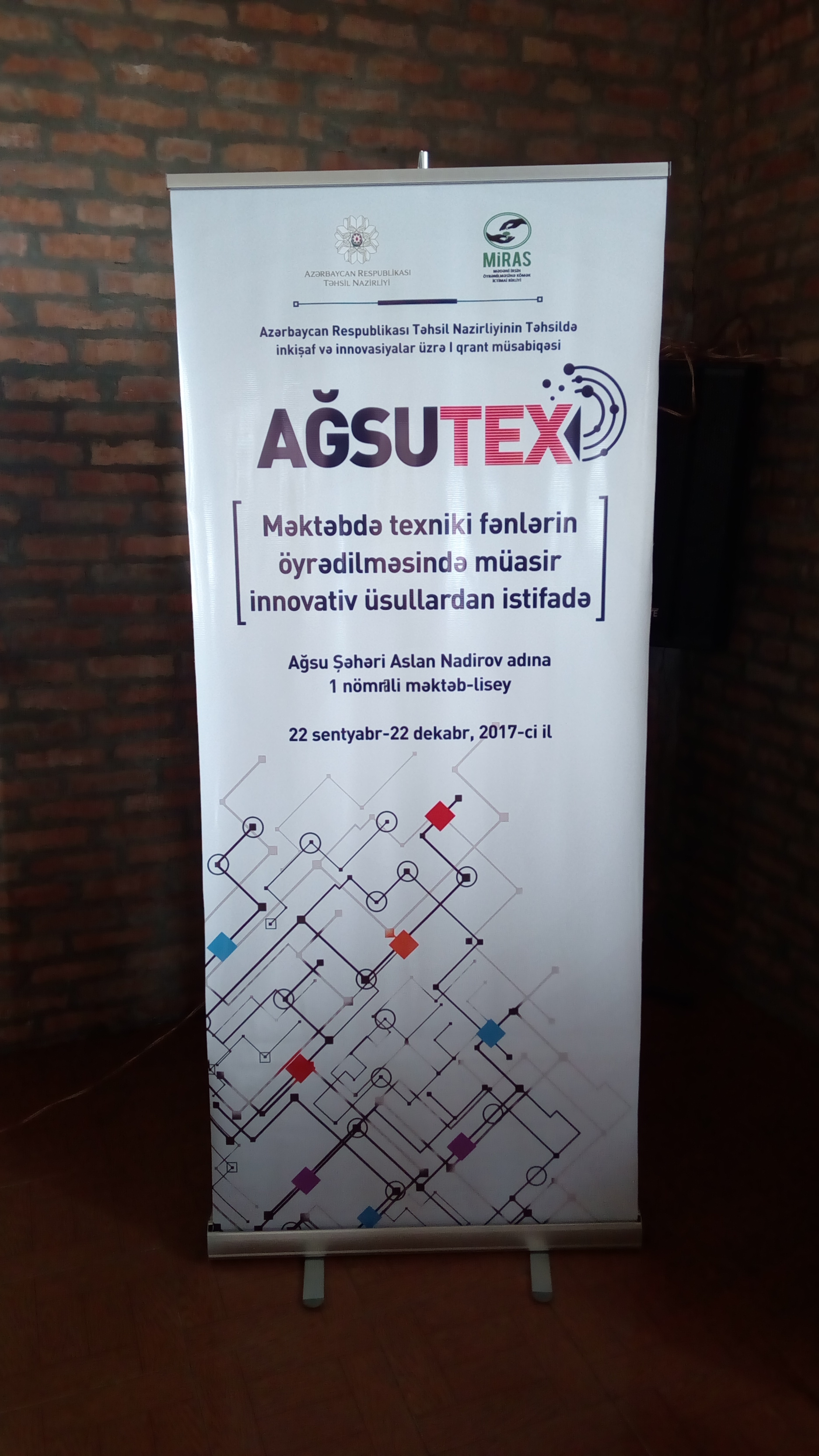 Orta əsr Ağsu şəhəri Arxeoloji Turizm Kompleksi